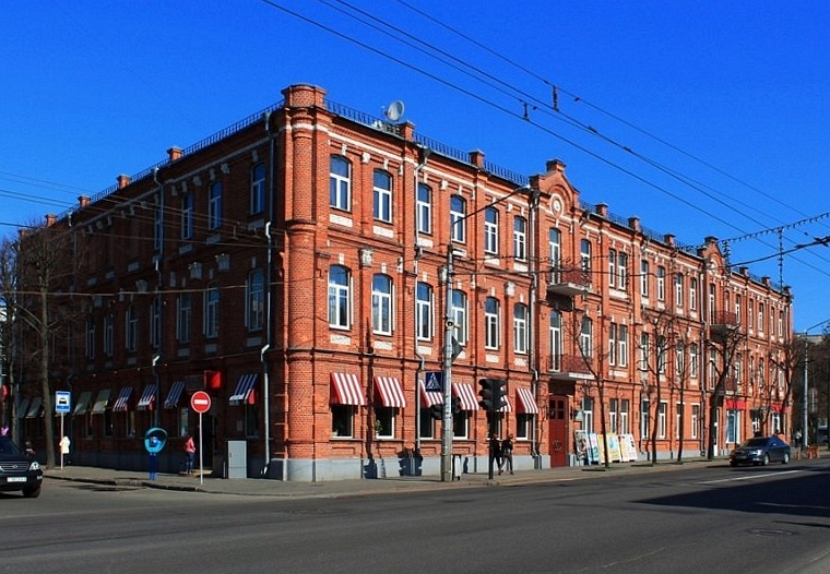 Будынак Дваранскага сходу